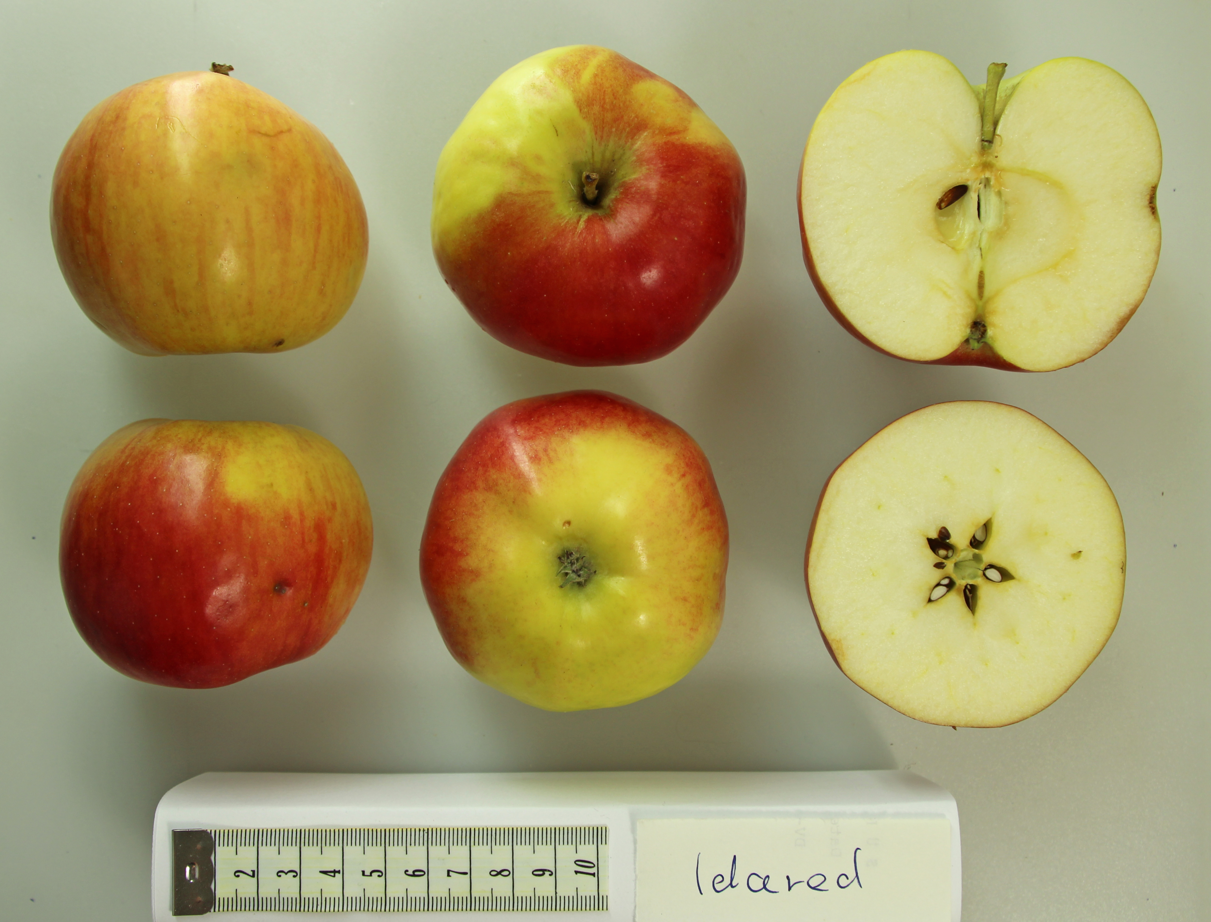 Bildinhalt: Sechs Ansichten von Äpfeln der Sorte Idared Aufnahmeort: Frankfurt am Main, Deutschland